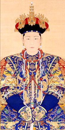 孝诚仁皇后朝服局部